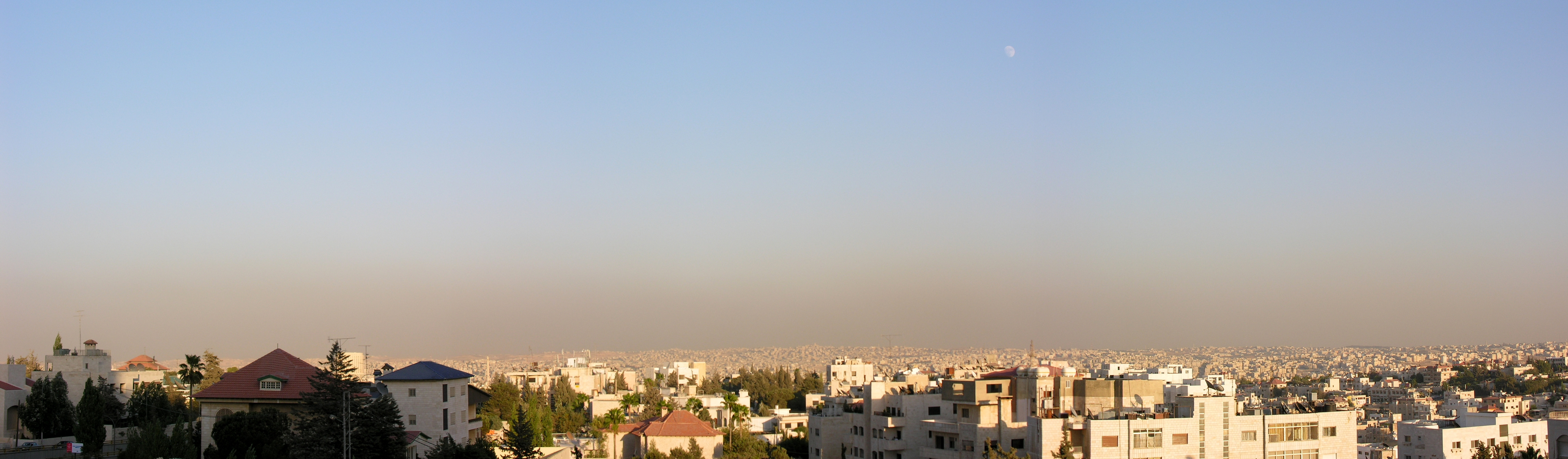 Amman